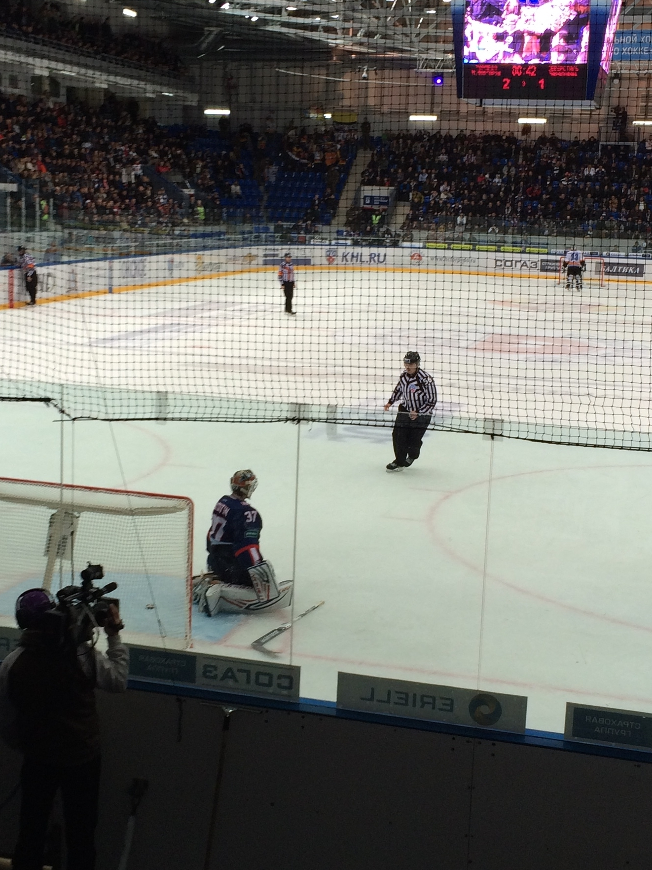 Вратарь ХК «Торпедо» Иван Касутин после ошибки, приведшей к пропущенной шайбе за 42 секунды до конца третьего периода